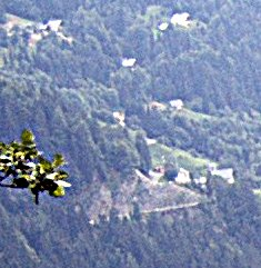 Une vue partielle du chef lieu de Cohennoz. Celui-ci ne comporte pas plus de cinq à six maisons.